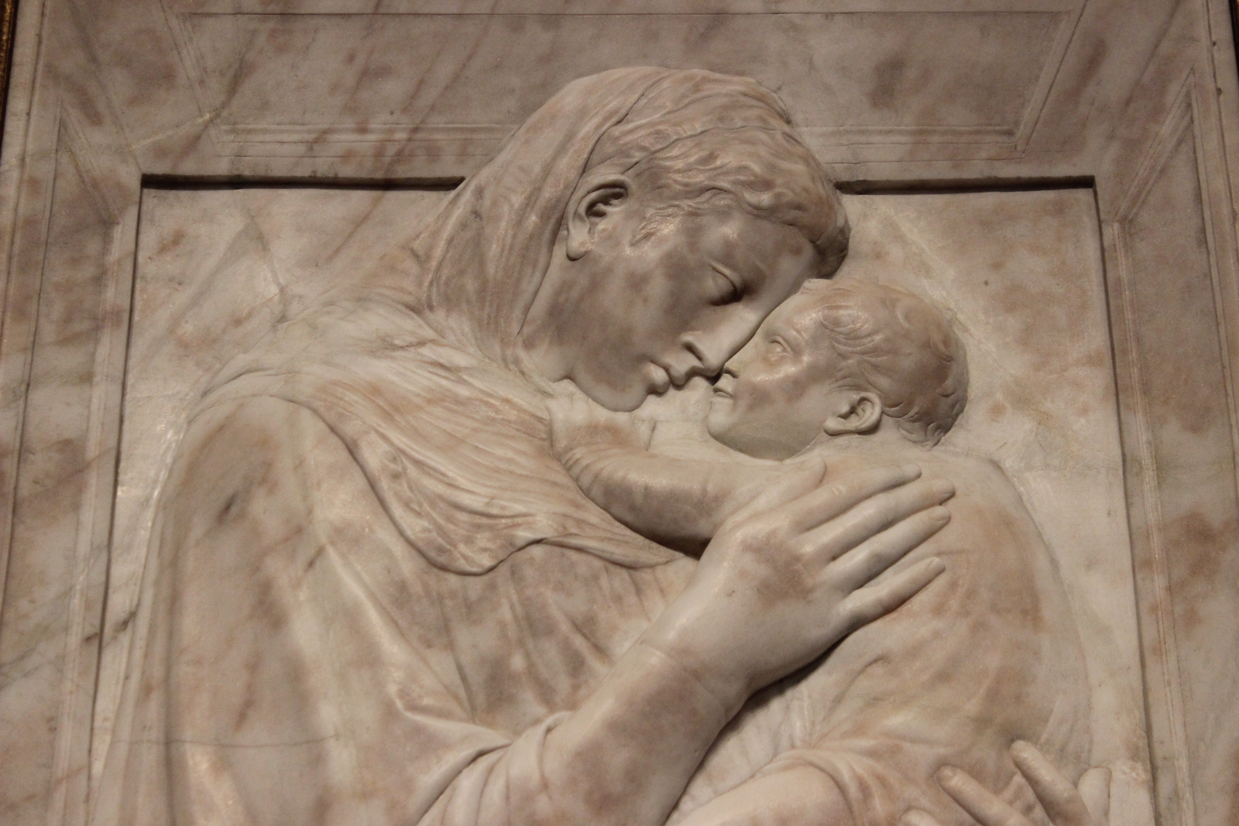 Donatello. Madonna Pazzi. Bode Museum, Berlín.